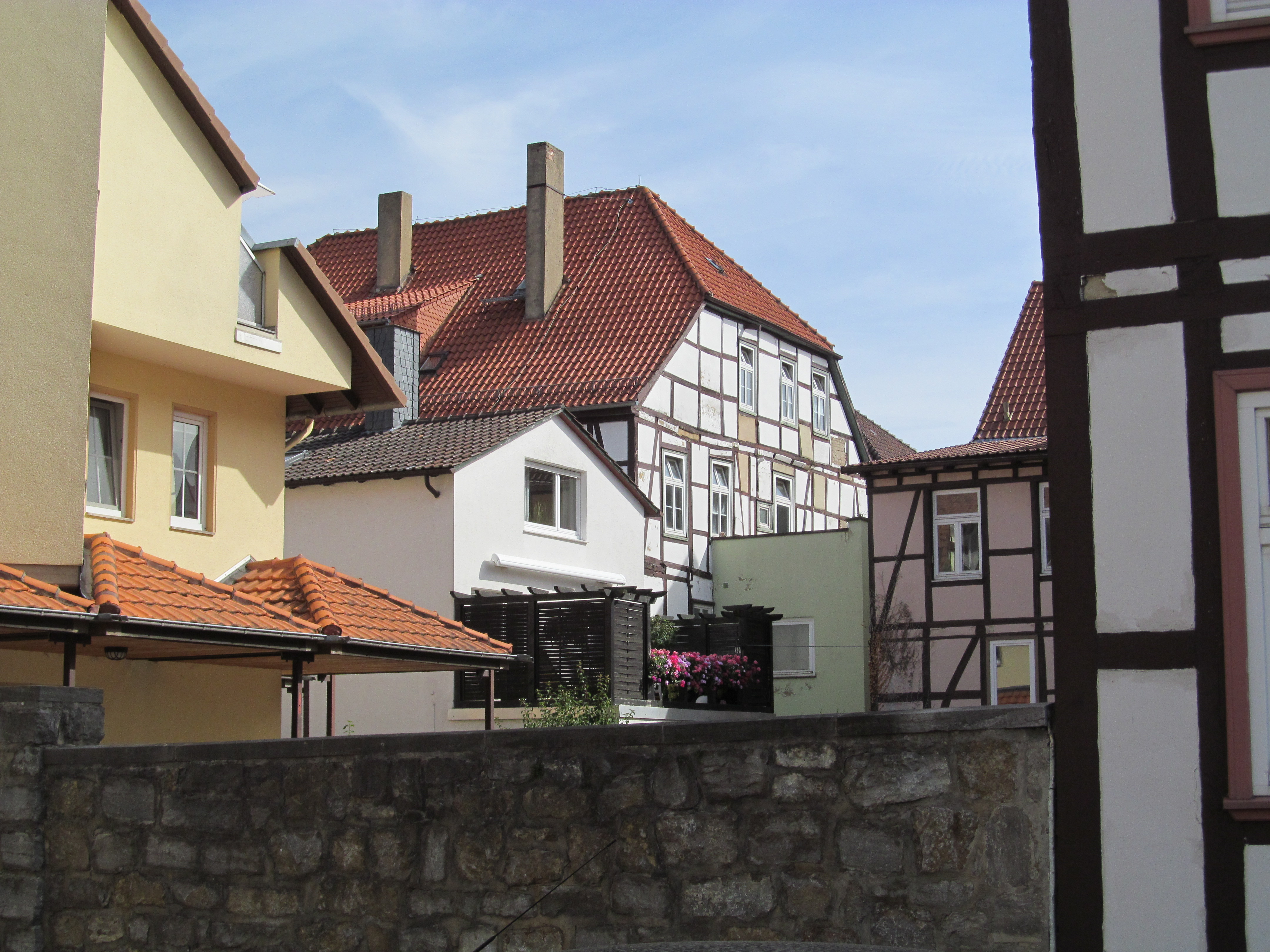 Blick von der Josef-Wirmer-Straße auf die Rückseite des Hauses Marktstraße 18 in Warburg